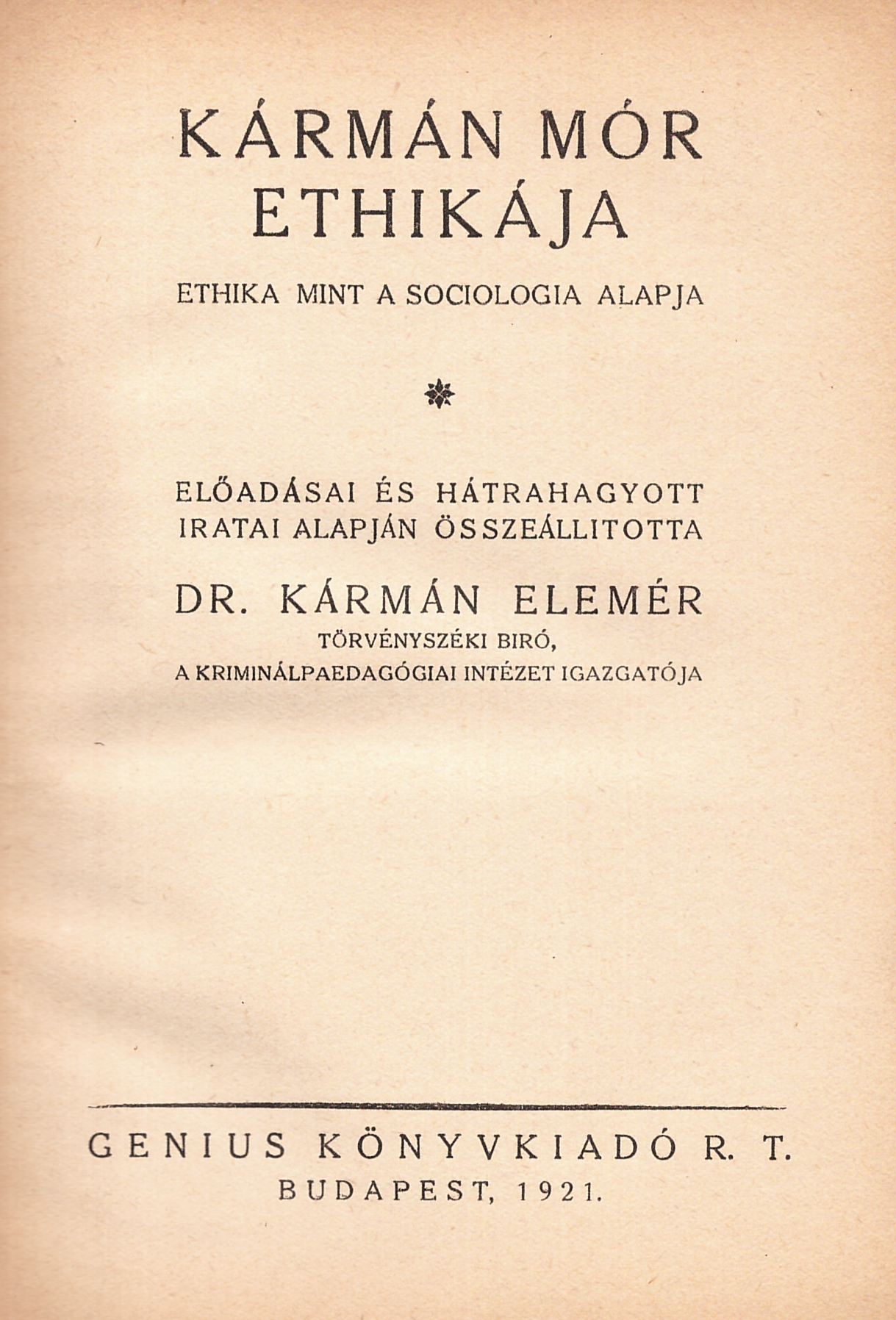 Kármán Mór (1843-1915) ethikája, összeállította Kármán Elemér (1876-1927).